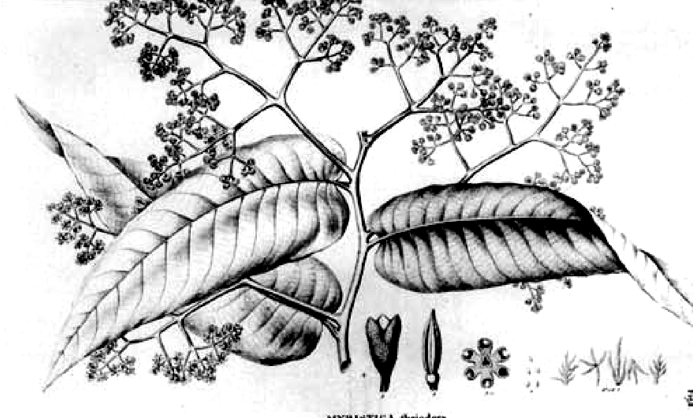 Virola elongata (syn. Virola theiodora)